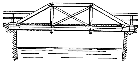 Träbro. Hängverk